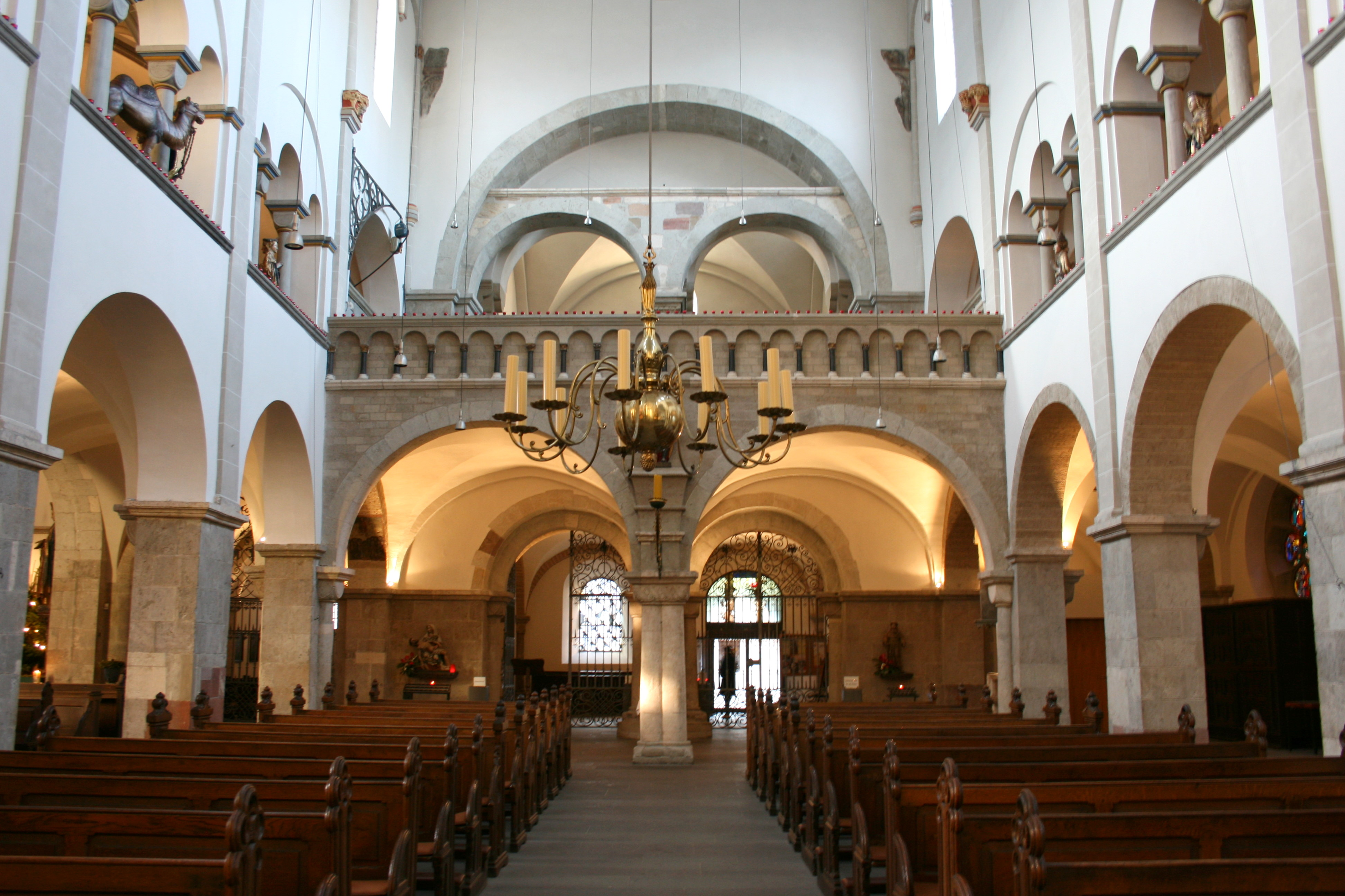 Sankt Ursula in Köln